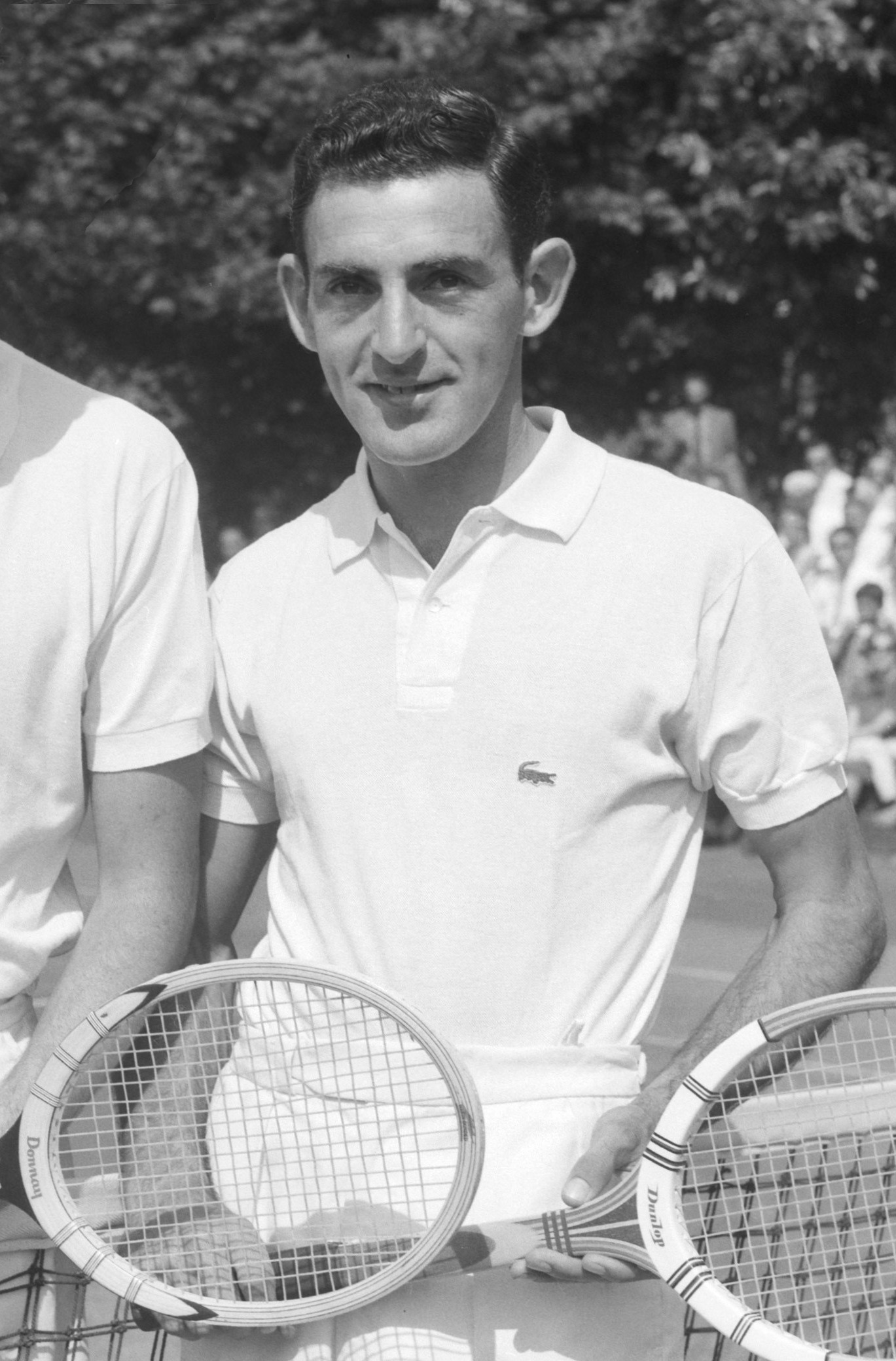 Finale van het internationale tennistoernooi te Hilversum. Legenstein